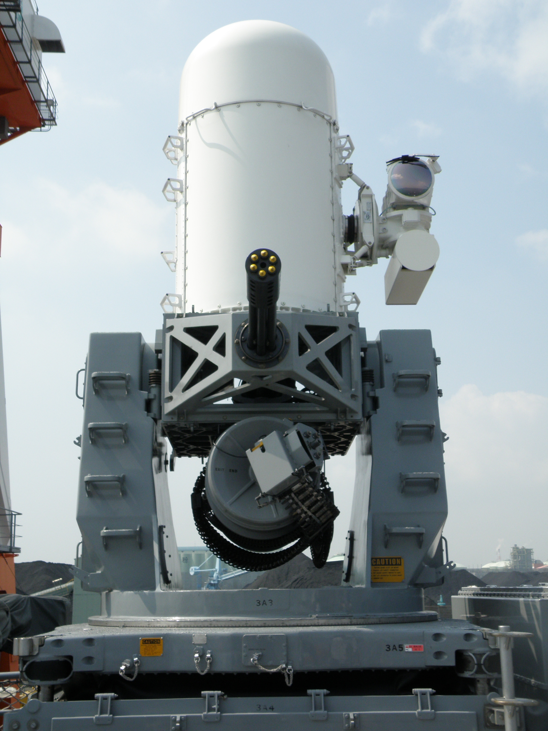 艦首CIWS